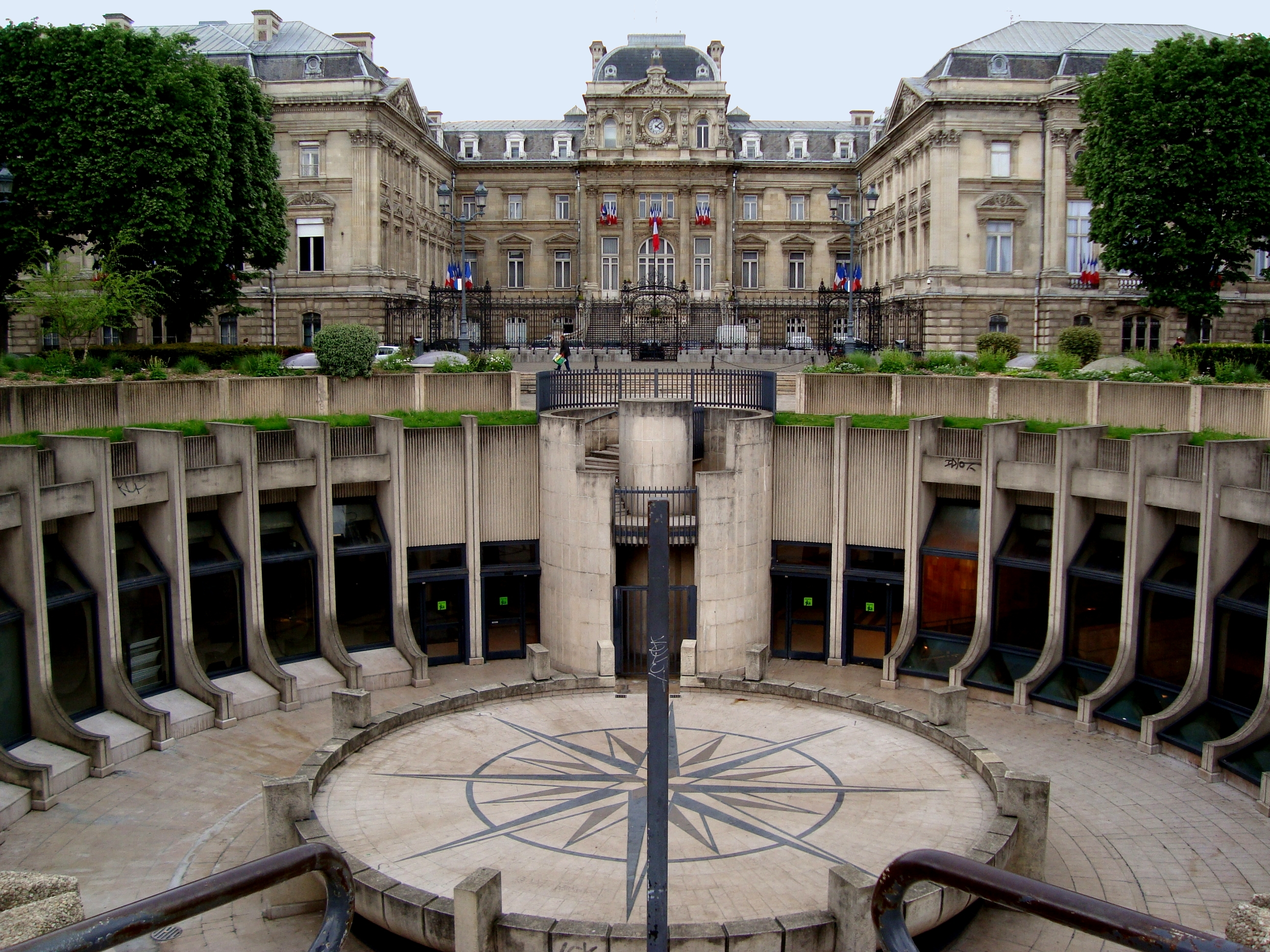 La préfecture de Lille (Nord) place de la République. Elle a été construite de 1865 à 1904 par les architectes Charles Marteau et Léonce Hainez.